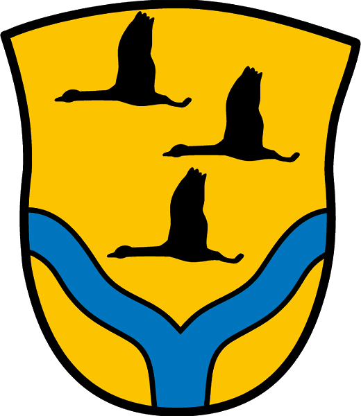 Coat of arms Vahlde, Wappen der Gemeinde Vahlde